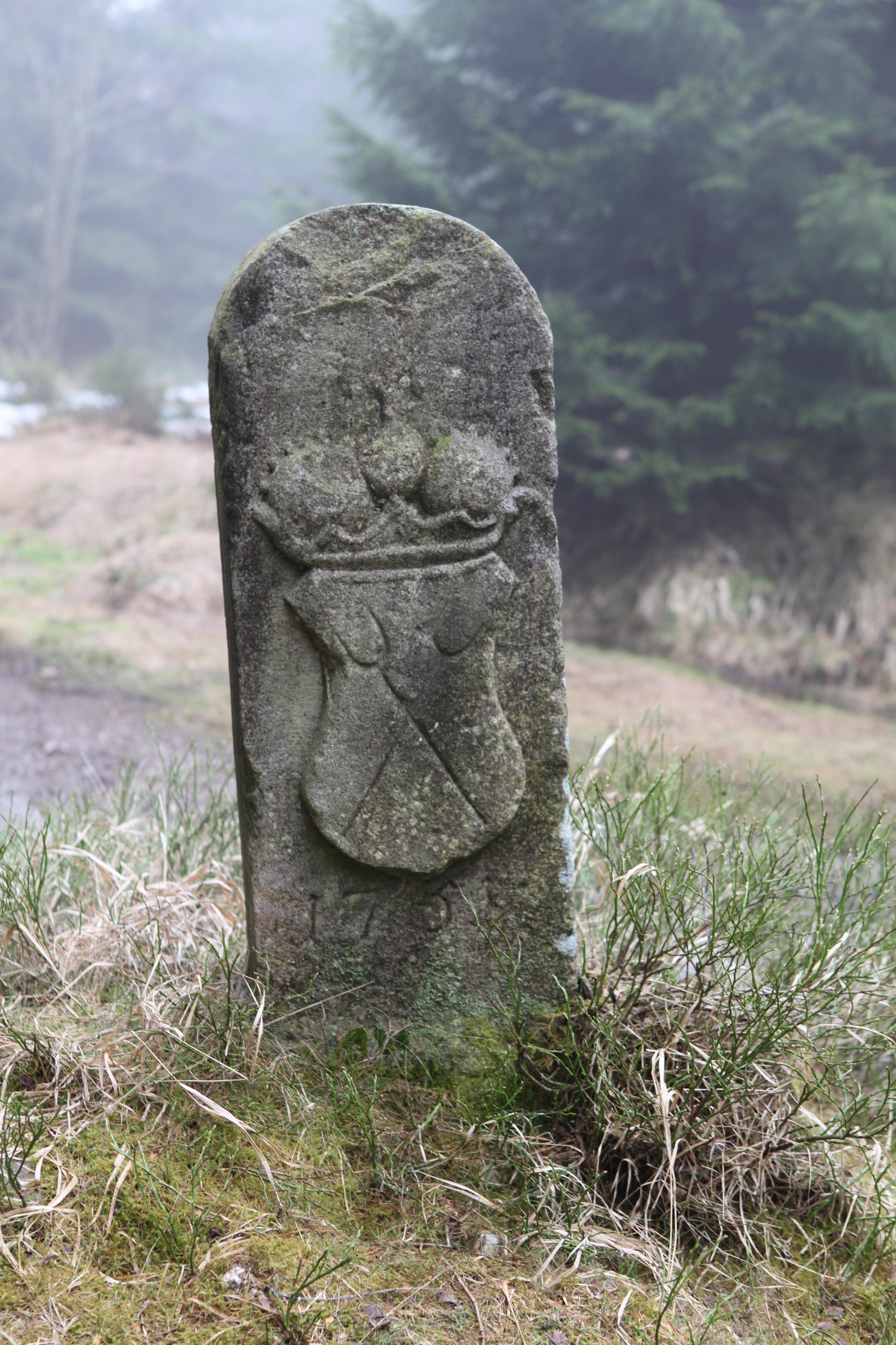 Landesgrenzstein Nr. 93 mit Wappen des Fürstentums Schwarzburg-Rudolstadt, Rennsteig bei Goldisthal in Thüringen